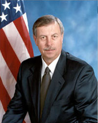 Dave D. Lauriski Upload Source evrik 275x355 (11829 bytes) ( Dave D. Lauriski)